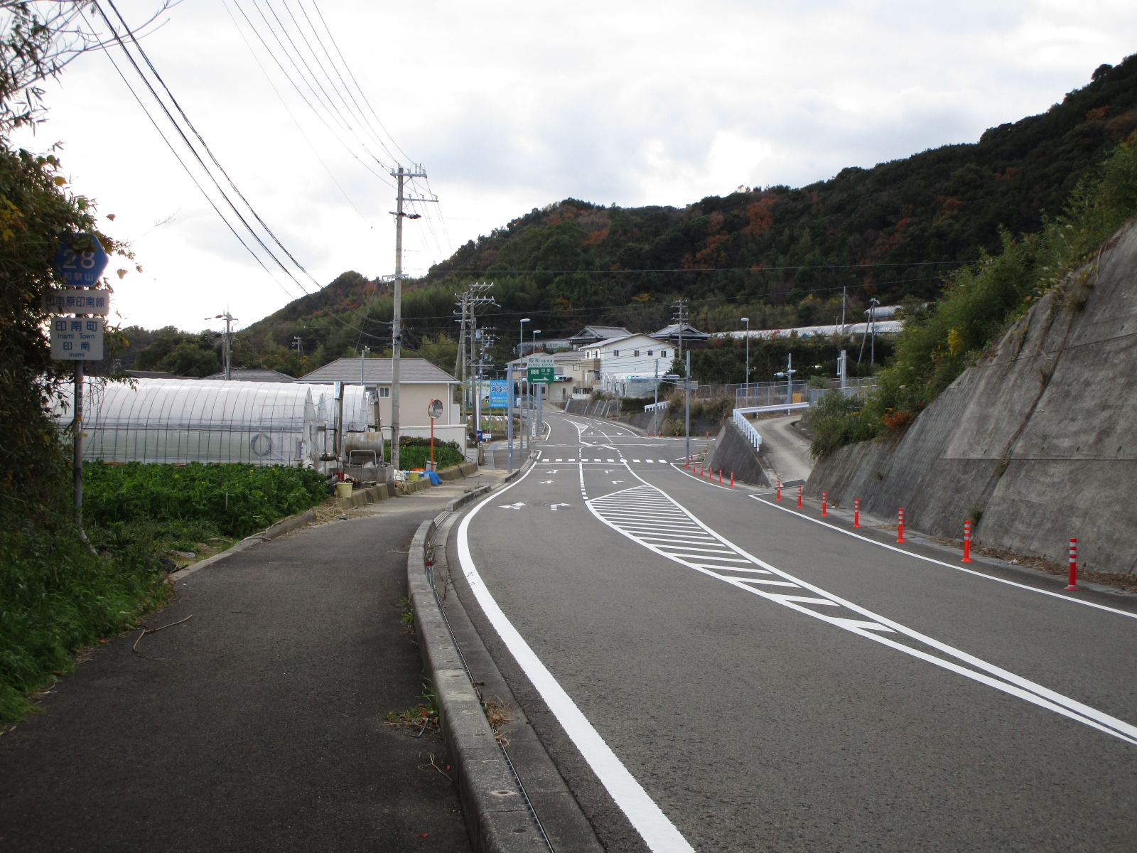 和歌山県道28号印南原印南線 印南インターチェンジ入口付近